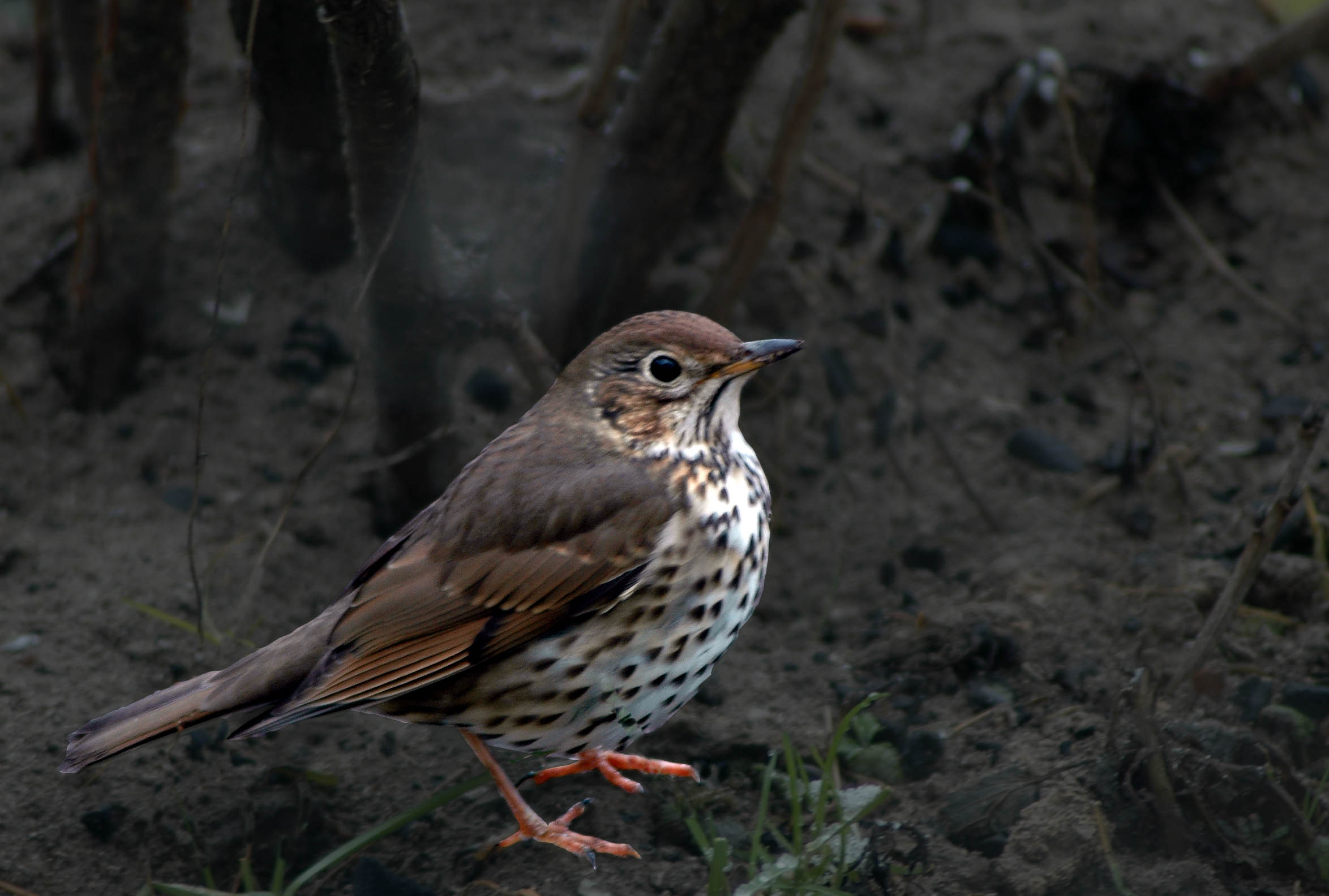 Singdrossel (Turdus philomelos)